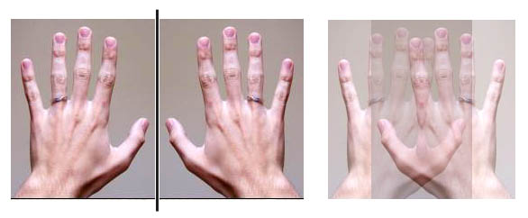 ידיים כיראליות. מקור מויקישיתוף: , עיבוד על ידי Pixie